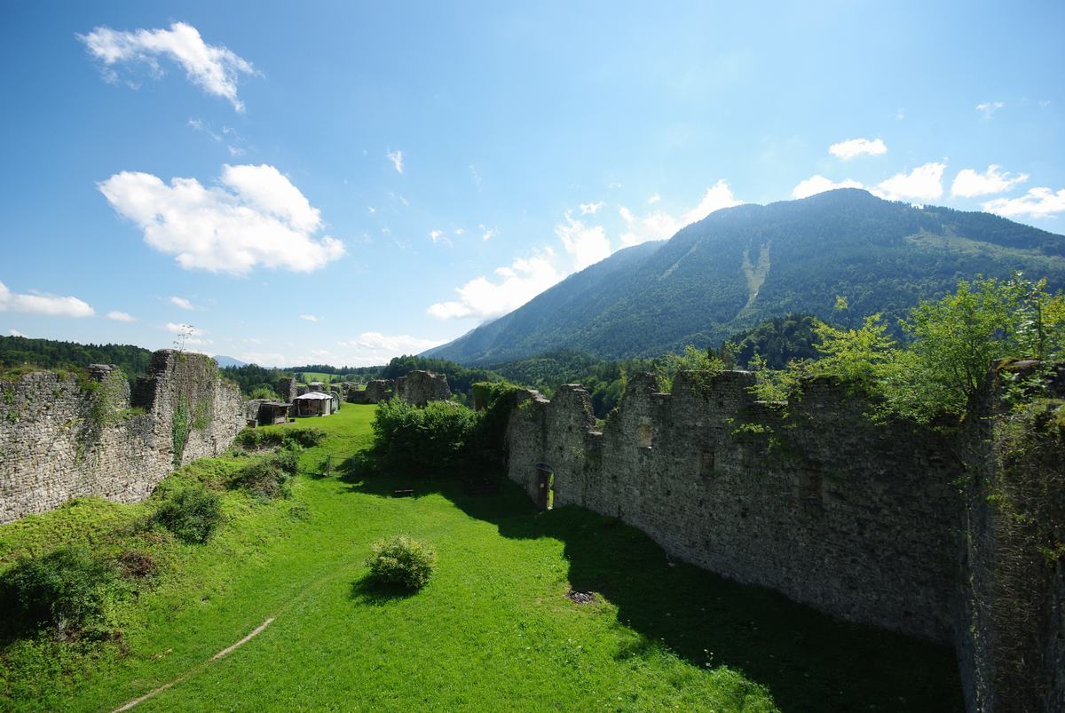 Plainburg, innerer Burghof, im Hintergrund der Untersberg. (Blickrichtung Osten)